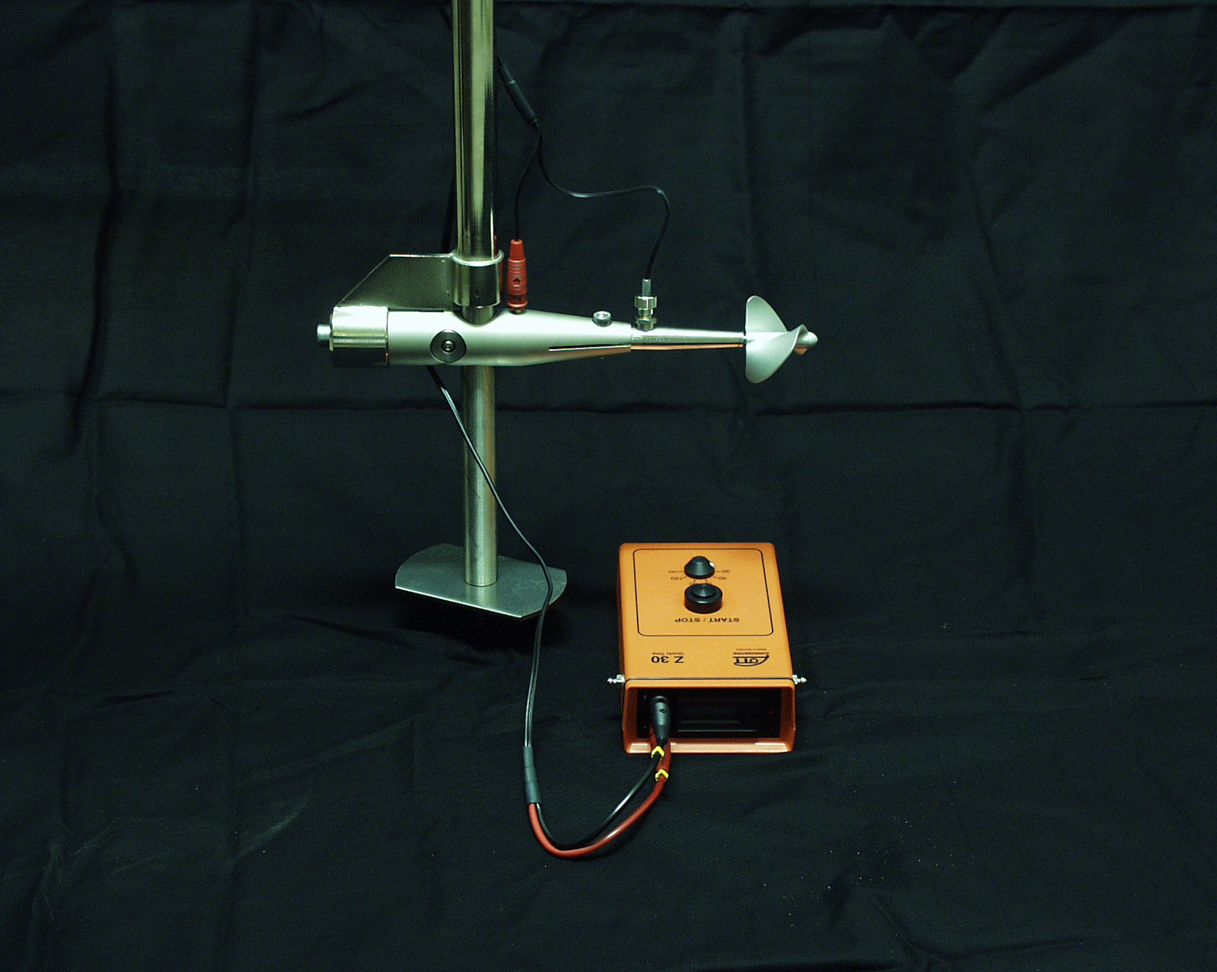 Current meter Ott C-2 on 20 mm rod with counter